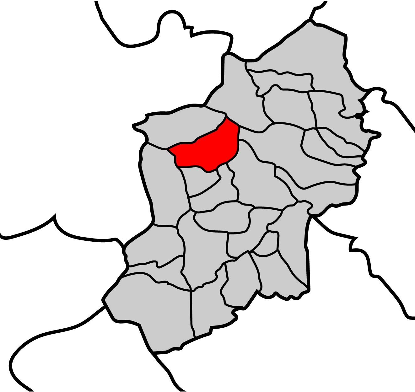 Mapa de la parroquia de Furco ayuntamiento de Becerreá